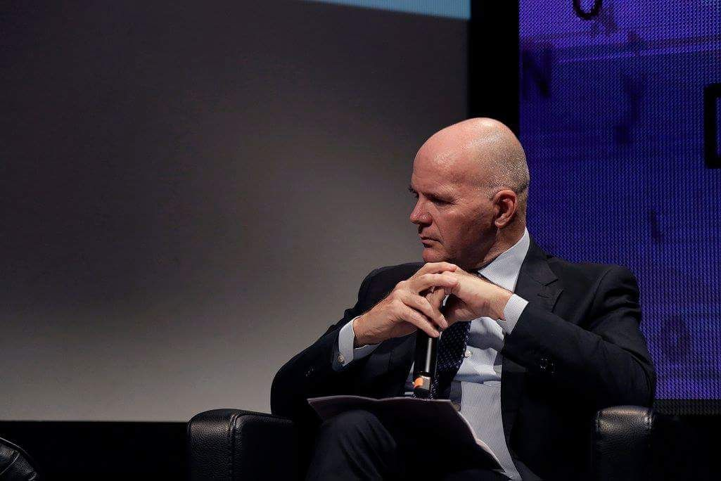 Filippo Gaudenzi